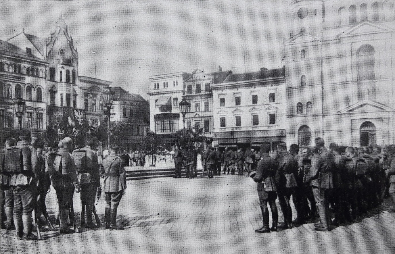 Słuchacze Wielkopolskiej Szkoły Podchorążych Piechoty na mszy polowej na Rynku w Bydgoszczy; 18 08 1920